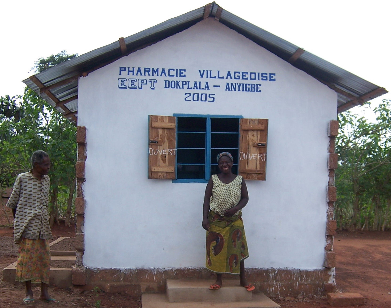 Eine Apotheke in Dokplala im Südwesten Togos.